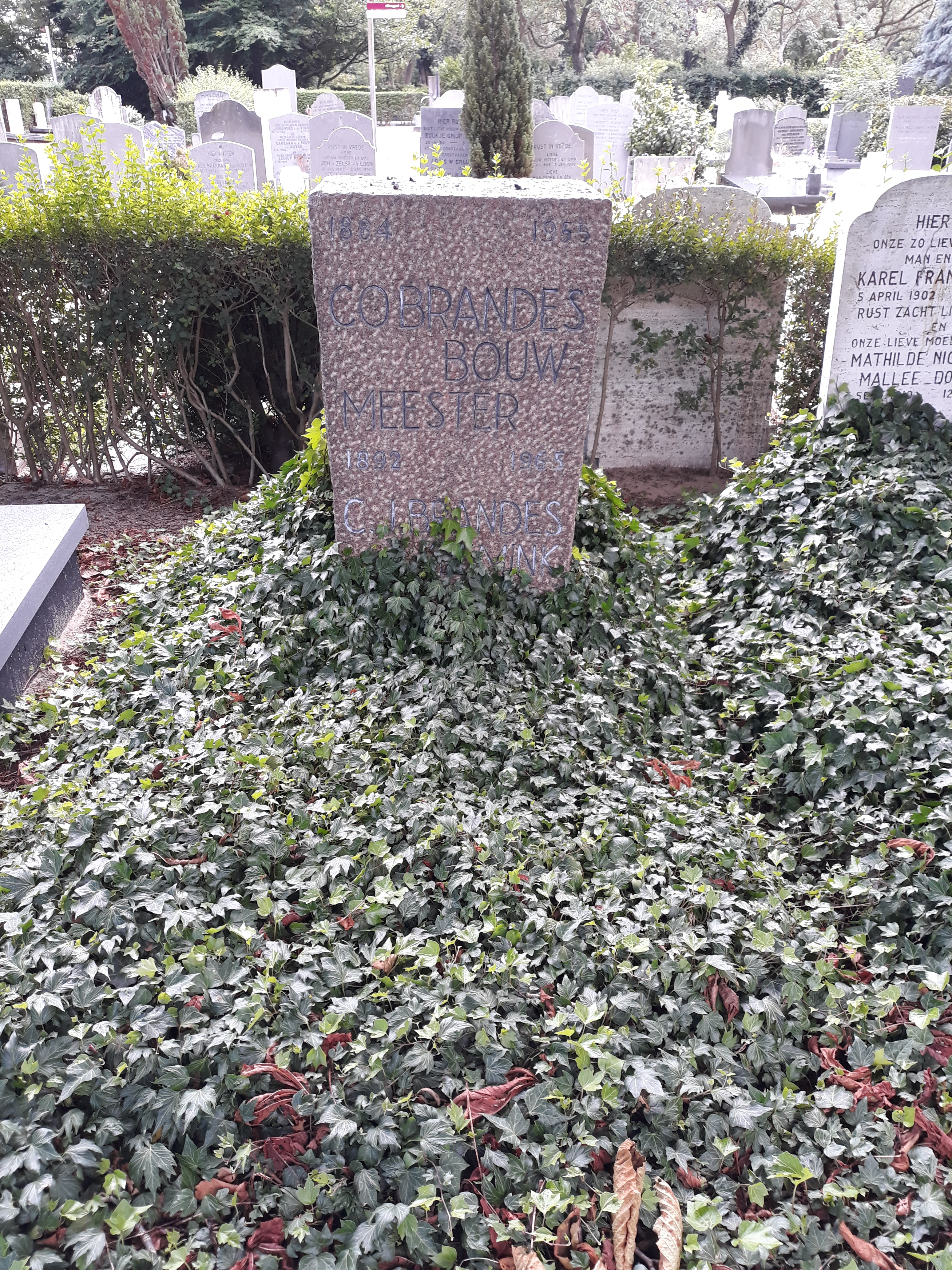 Das Grab des niederländischen Architekten Co Brandes auf dem Friedhof Oud Eik en Duinen in Den Haag.